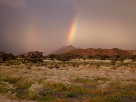 Hügellandschaft um Grünau in Namibia. Hillside near Grünau, Namibia.